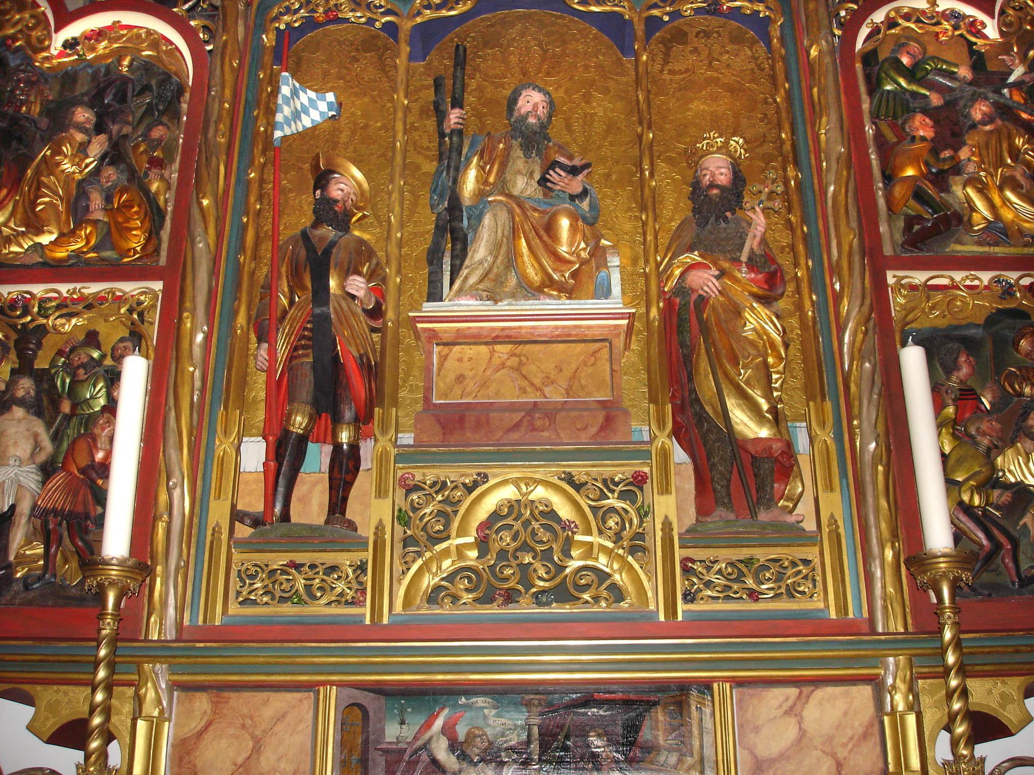 Andreasaltar in der Sebastianskapelle